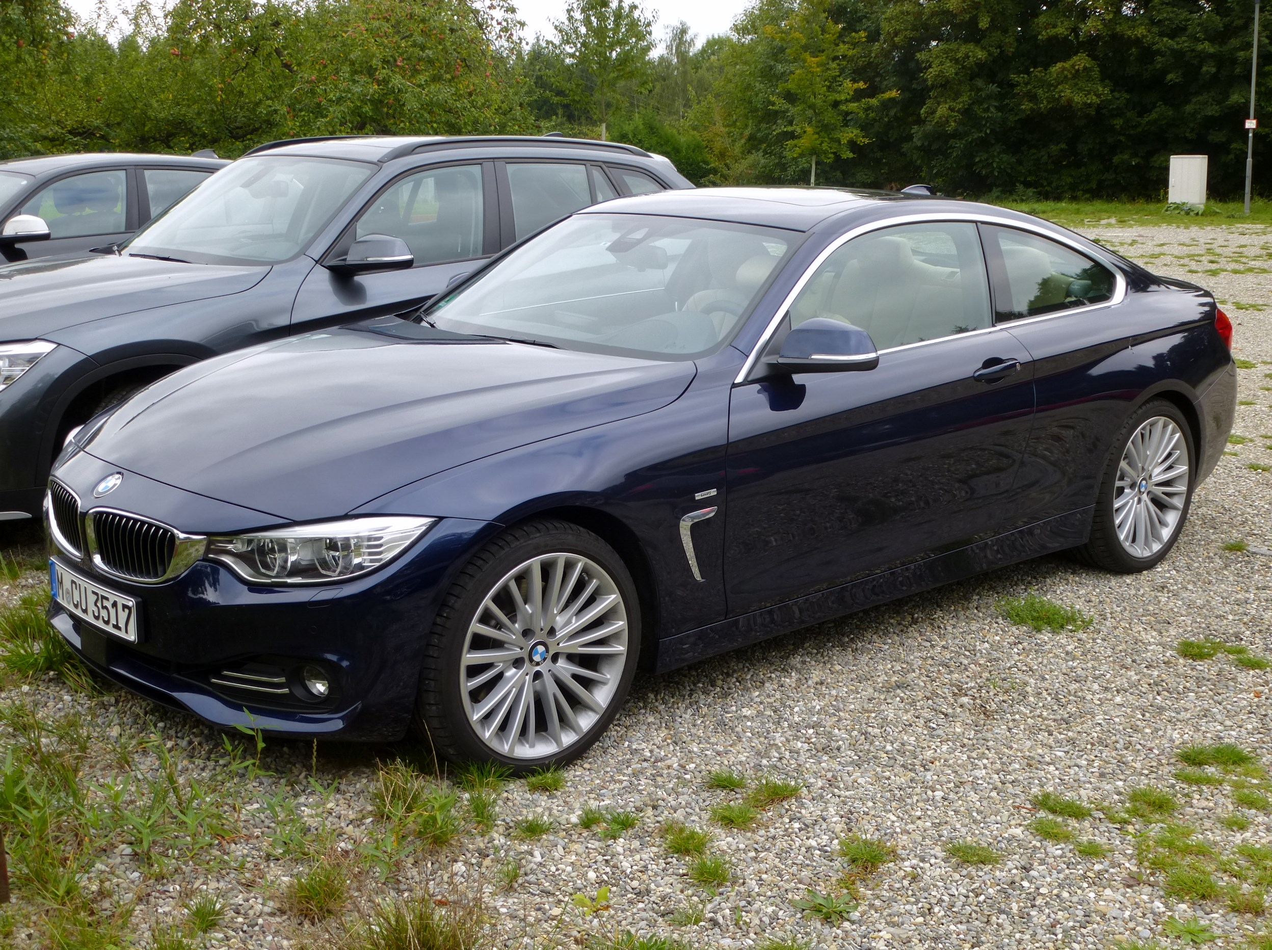 BMW 4er Coupé